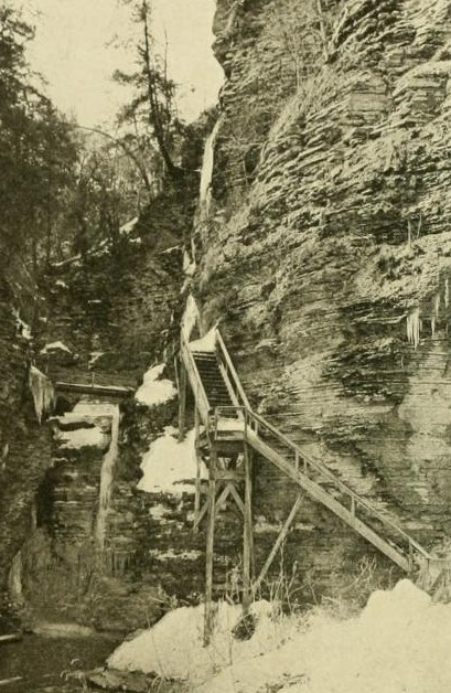 Elmira and Seneca Lake Railway - Eingang zur Watkins-Klam